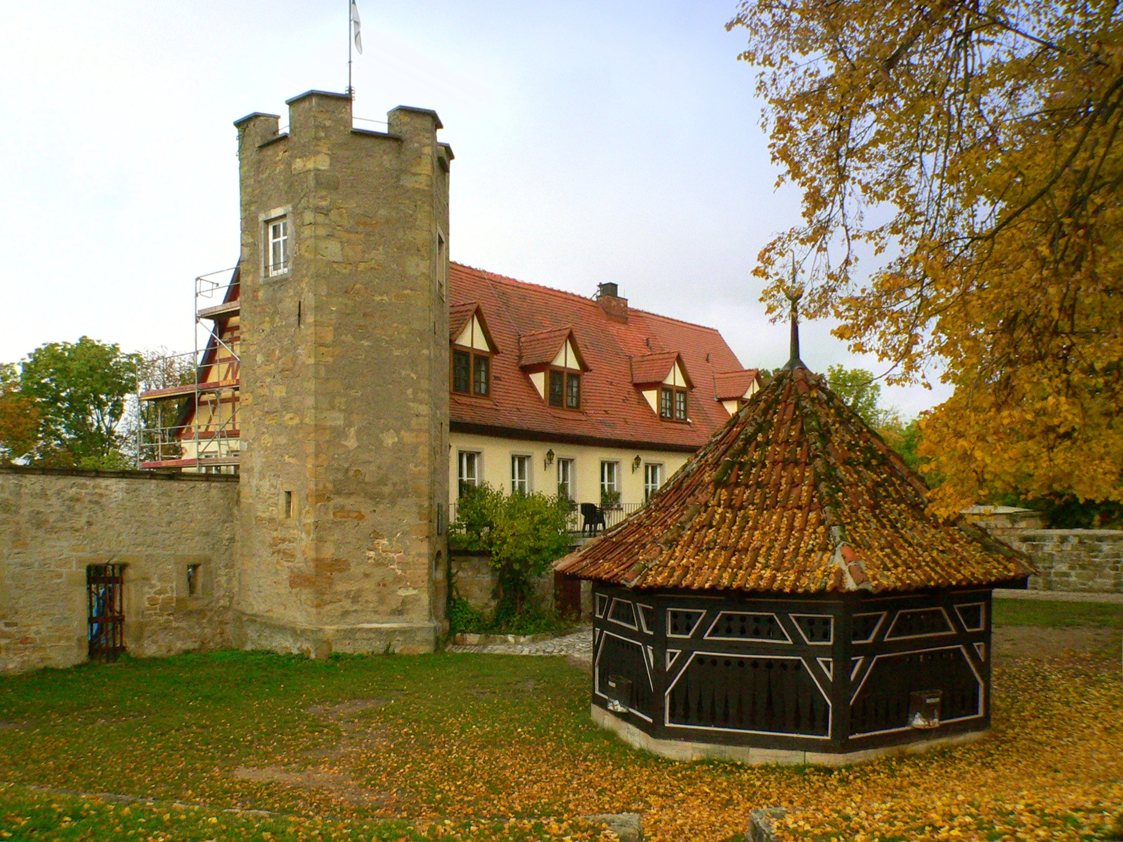 Burg Königsberg in Bayern - Innenhof mit Brunnen